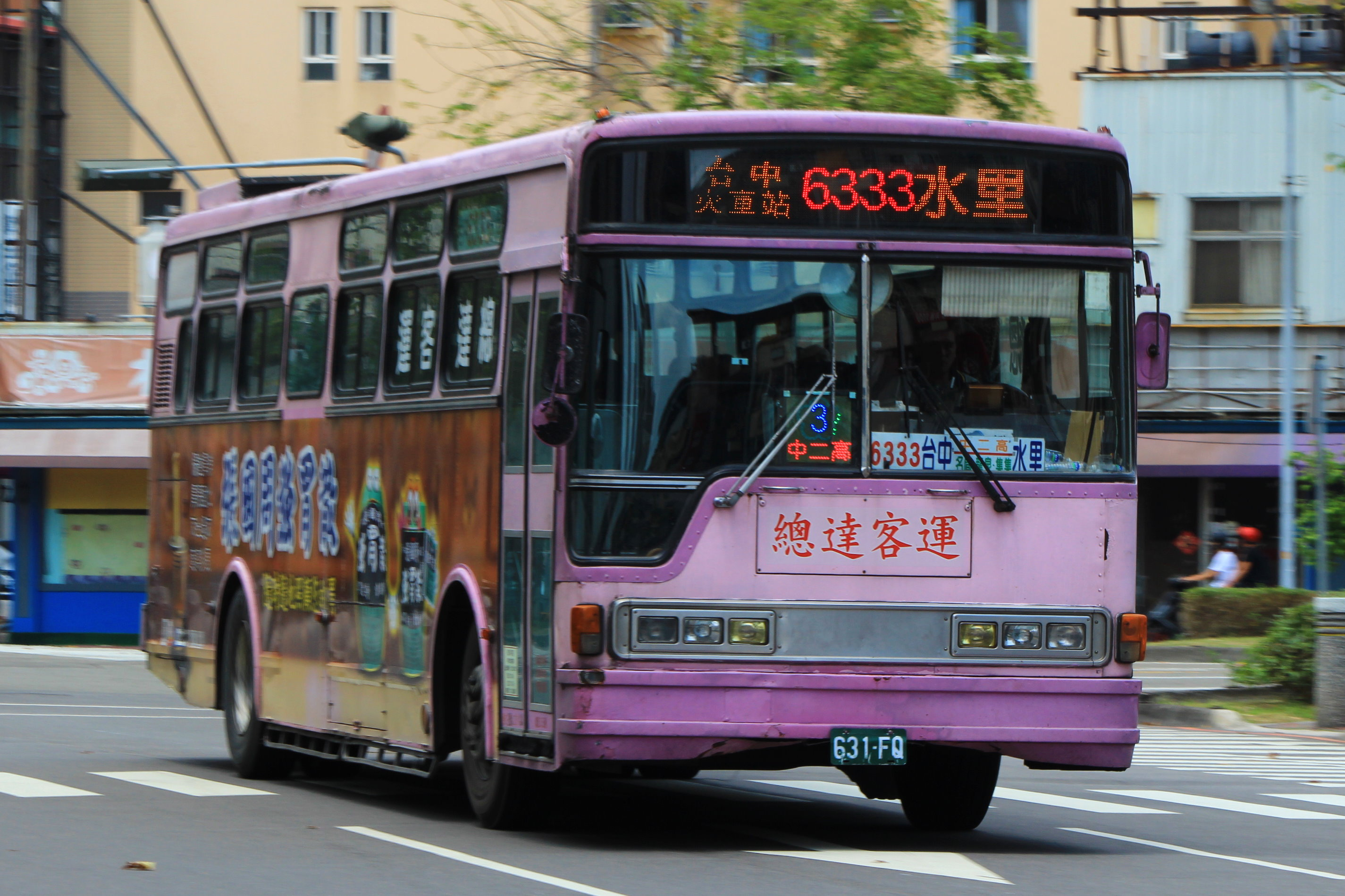 2001〈2010〉 ISUZU LT134P（固特）